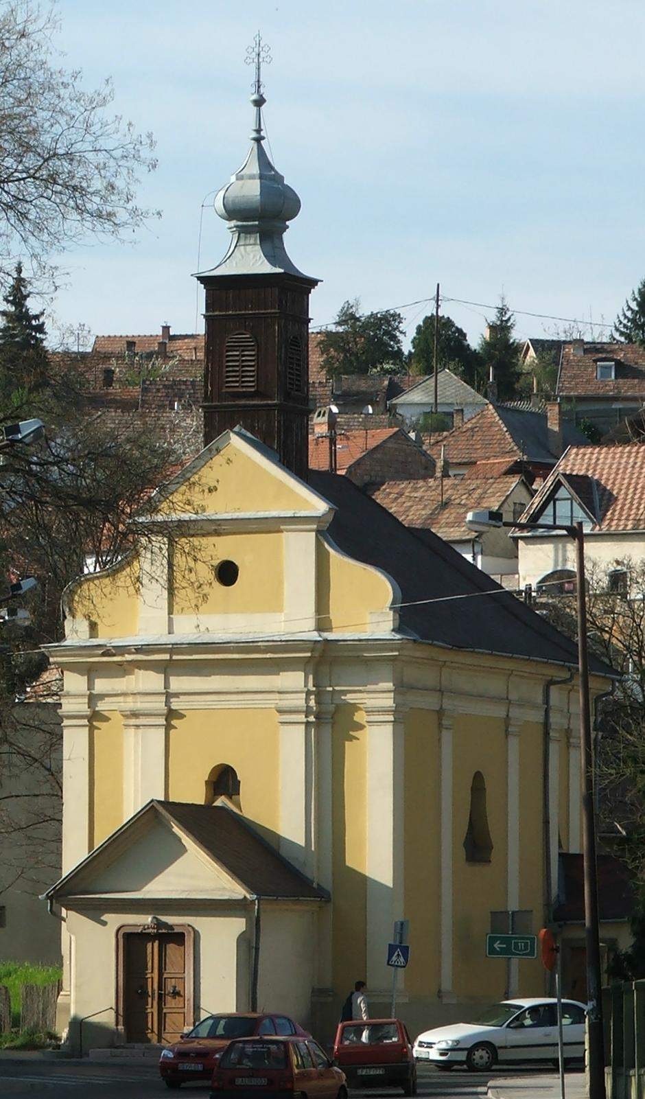 St Stephen-chapel, Esztergom, Hungary